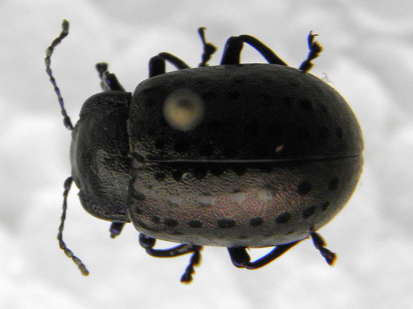 Chrysolina exanthematica. Приморский край, г. Владивосток